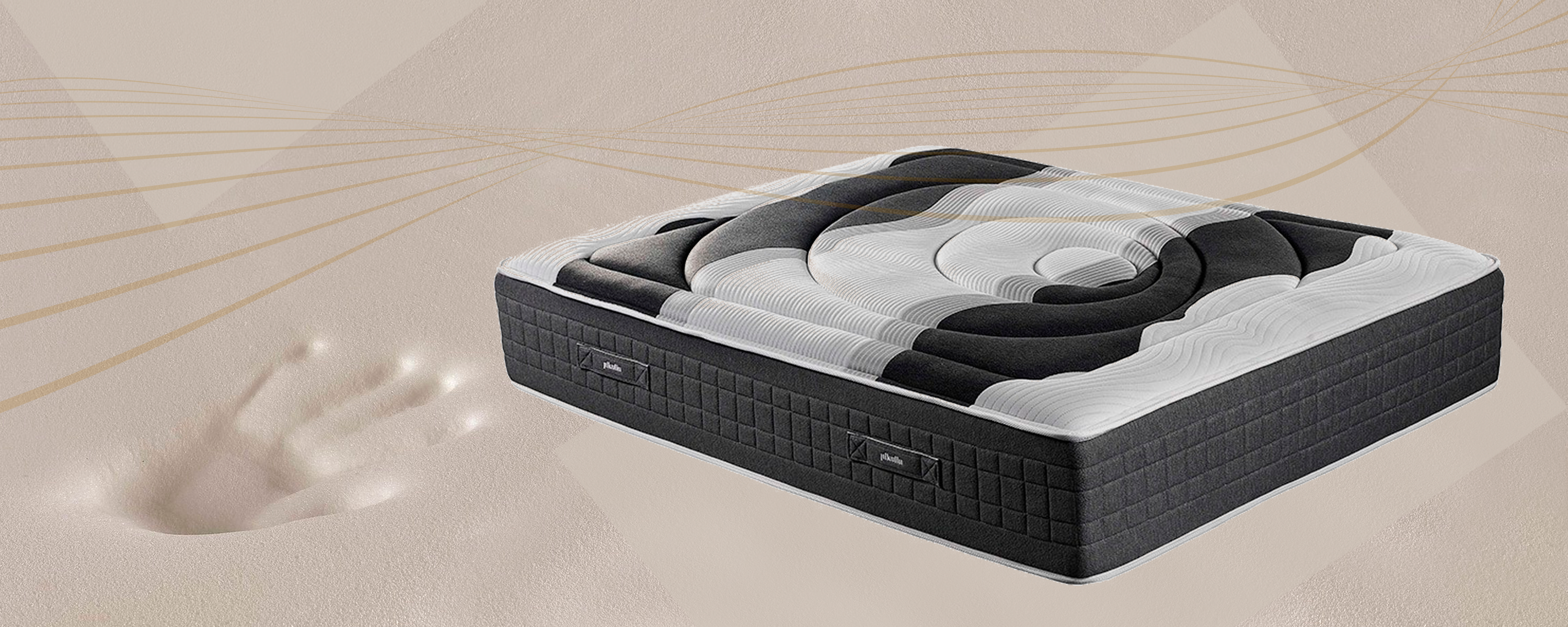 Los colchones viscoelásticos están fabricados con una espumación creada por la Nasa. Este material ofrece una gran adaptabilidad y proporciona un descanso excepcional.